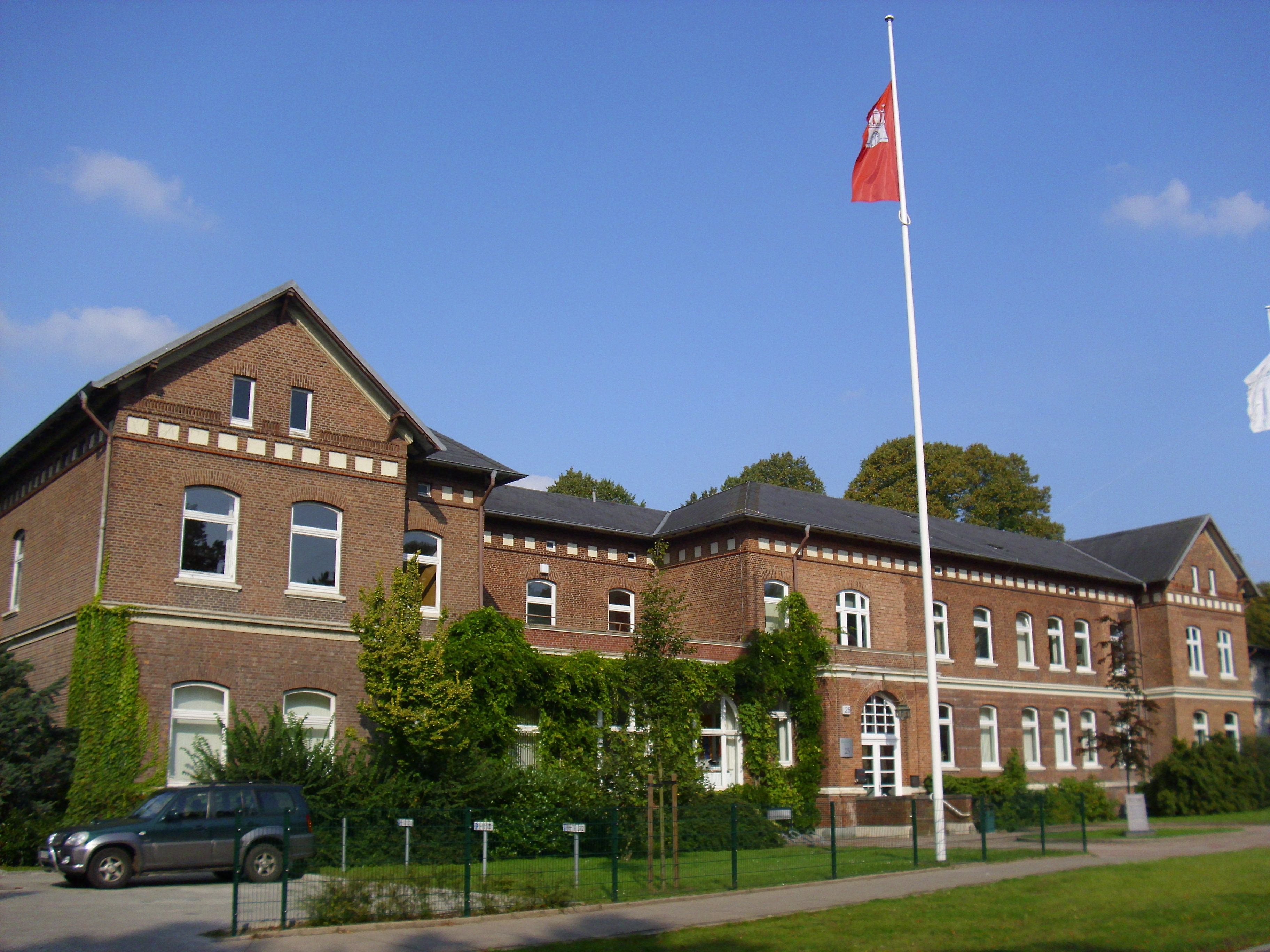 Ensemble Ochsenzoll, Haus 25, Langenhorner Chaussee 560 This is a photograph of an architectural monument.